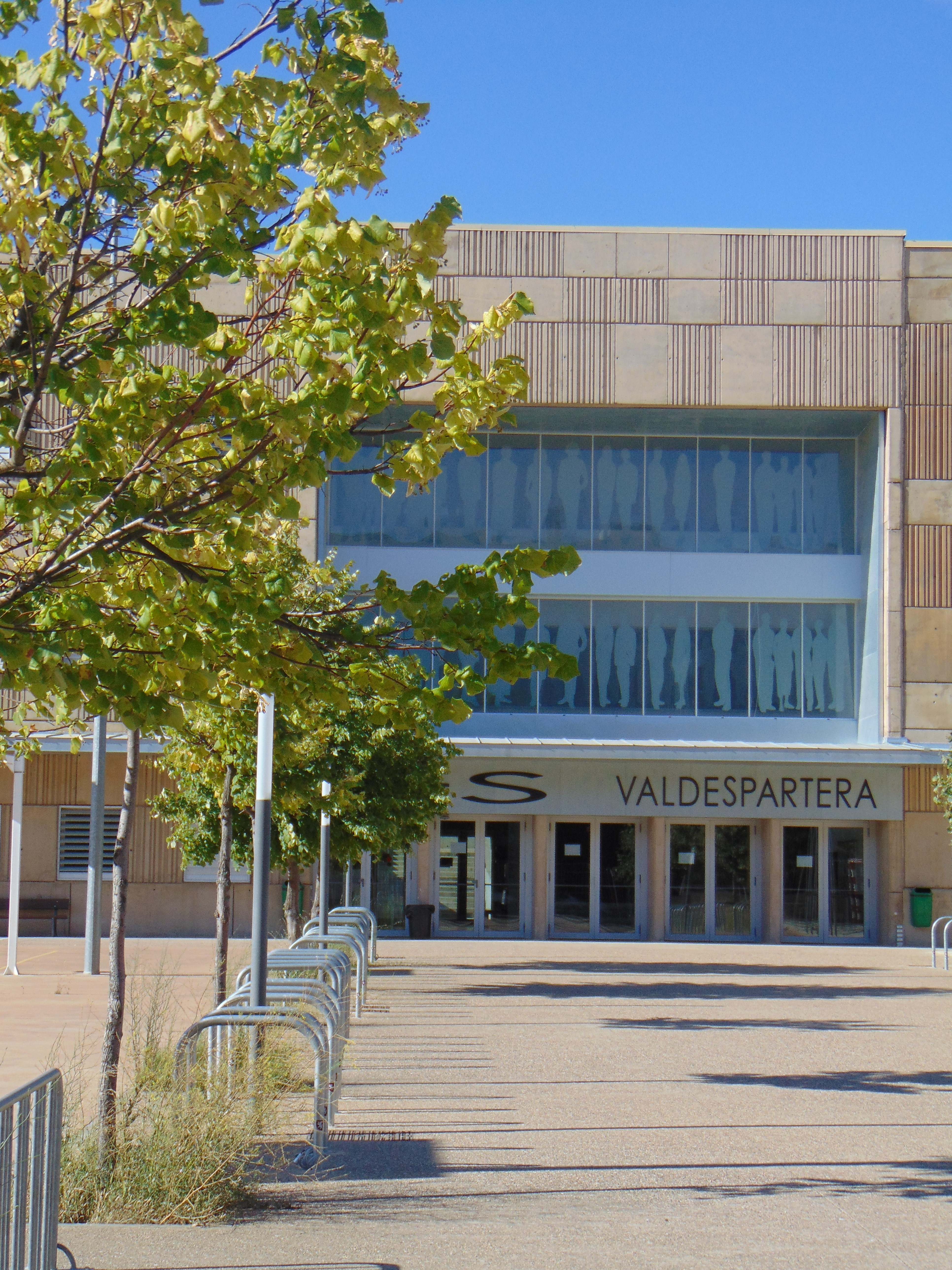 Instituto de Educación Secundaria Valdespartera en Zaragoza (España).